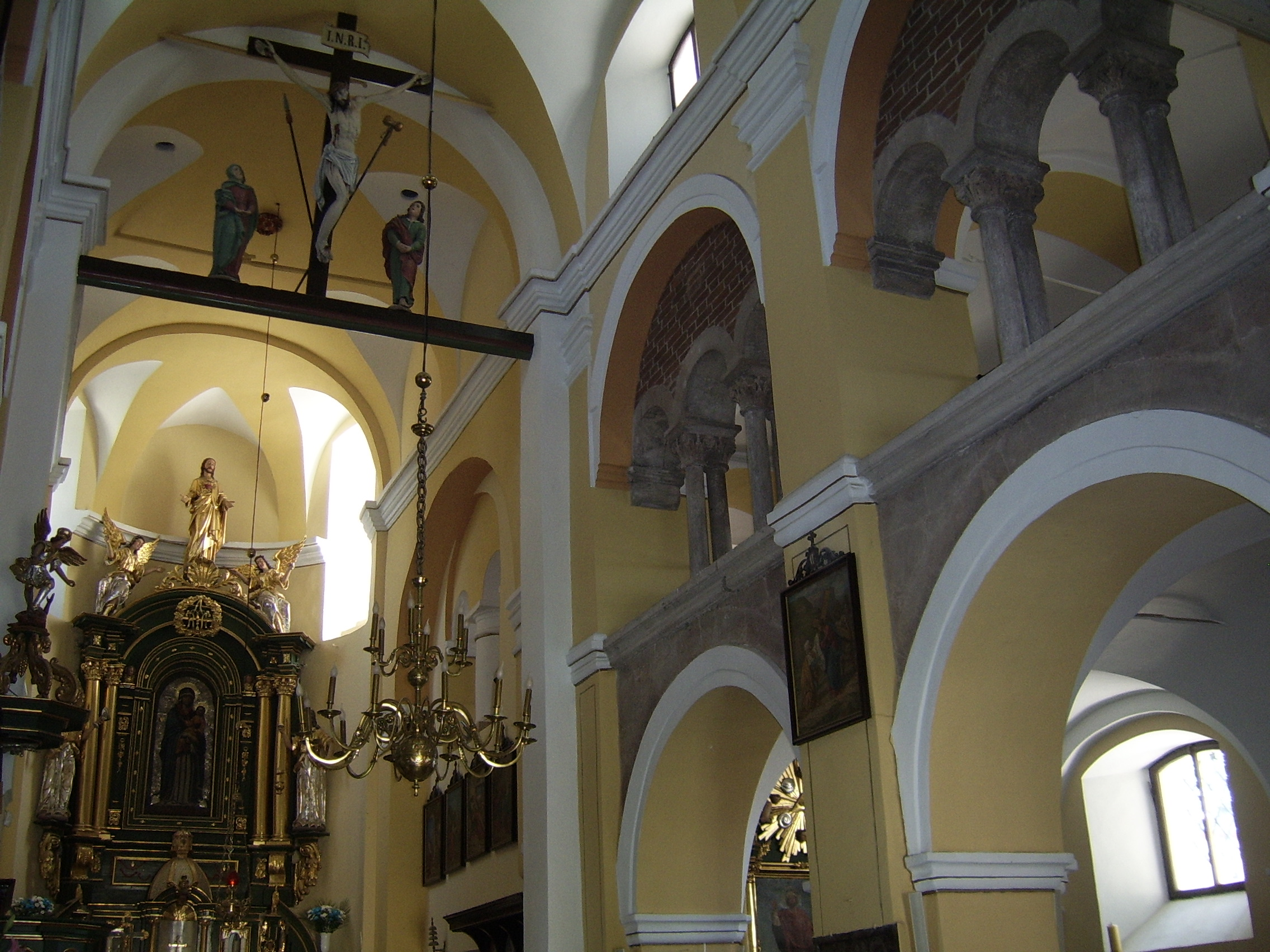 Kościelec (województwo małopolskie) - kościół pw. św. Wojciecha, wnętrze.